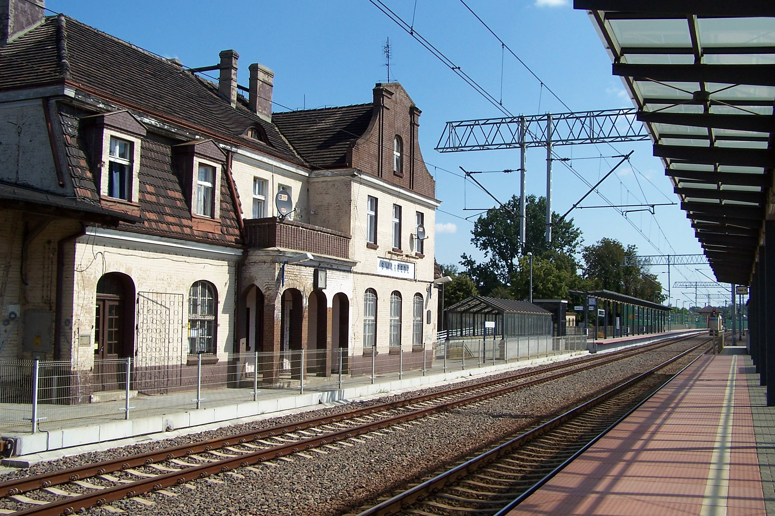 Der Bahnhof in Swarzędz, Polen